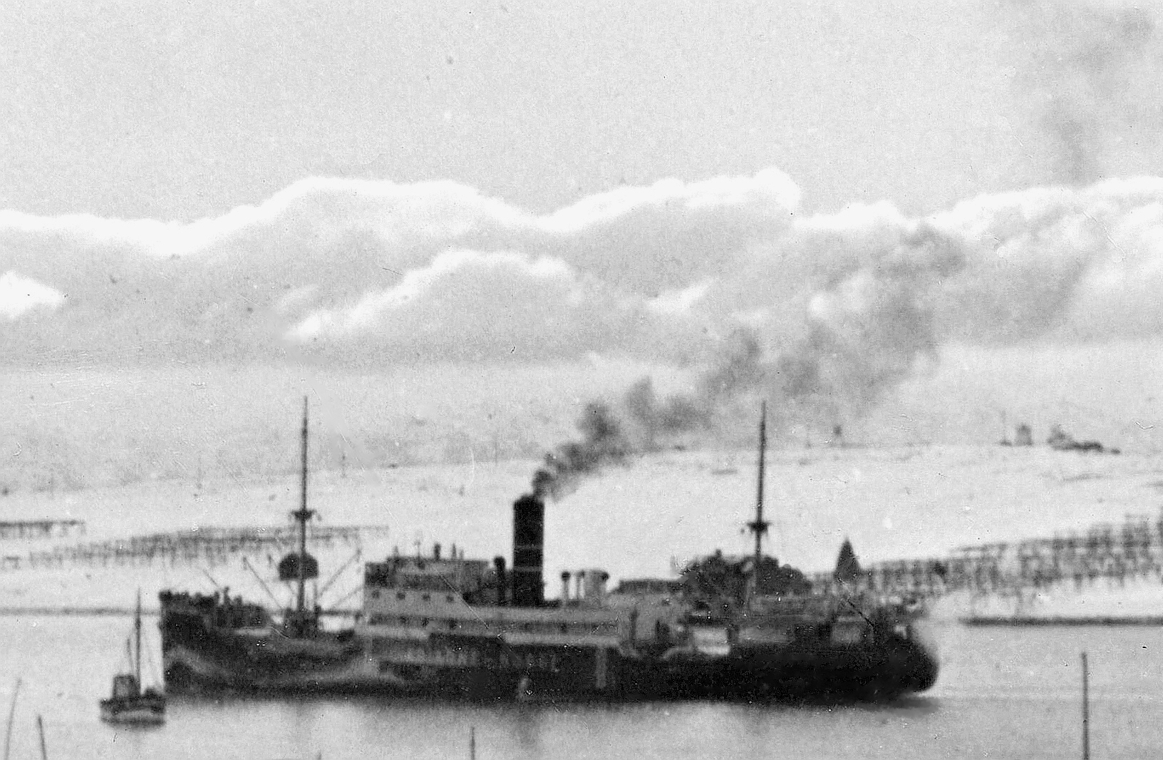 Format: Fotopositiv Dato / Date: 1940 Fotograf / Photographer: Kåre Hernes eller Trygve Gjervan Sted / Place: Vadsø, Finnmark Wikipedia: DS "Ariadne" Eier / Owner Institution: Trondheim byarkiv, The Municipal Archives of Trondheim Arkivreferanse / Archive reference: Tor.H42.B53.F3874 Fra Trygve B. Gjervans (1918 - 2004) samling. Gjervan var vernepliktig og tjenestegjorde ved Infanteriregiment 12 som holdt nøytralitetsvakt ved grensen til Sovjetunionen og Finland i Finnmark i 1940. Da tyskerne invaderte Norge 9. april ble IR 12 sendt sørover, og under general Carl Gustav Fleischer (1883 - 1942) ble de satt inn i det norske motangrepet ved Gratangen nær Narvik, hvor IR 12 led store tap. Fotograf er ifølge Gjervans notater hovedsakelig Kåre Hernes. Trygve Gjervans egen tekst til bildet: Fra Vadsø. Hurtigruta på vei inn til kai.